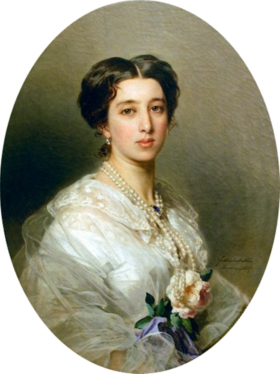 Княгиня Александра Елена (Лина) Николаевна Гагарина, ур. Гурьева (1825-1907), дочь дипломата графа Н. Д. Гурьева, с 1843 года жена князя Николая Николаевича Гагарина (1823-1902).